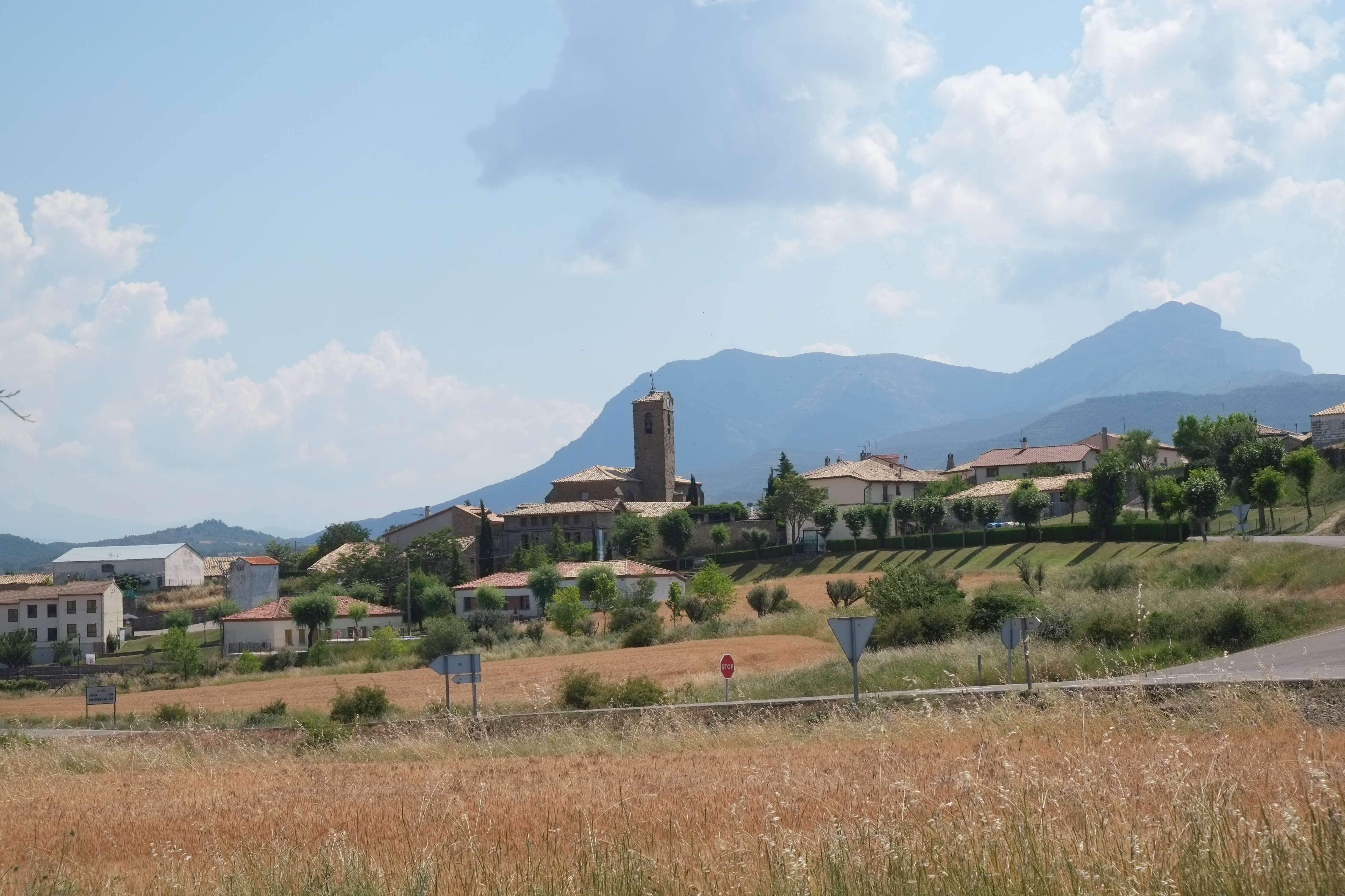 Bailo in der spanischen Provinz Huesca (Aragonien/Spanien)